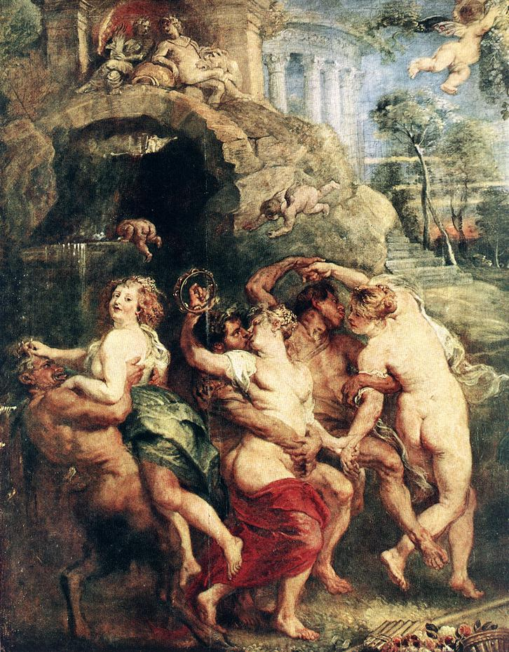 detail)